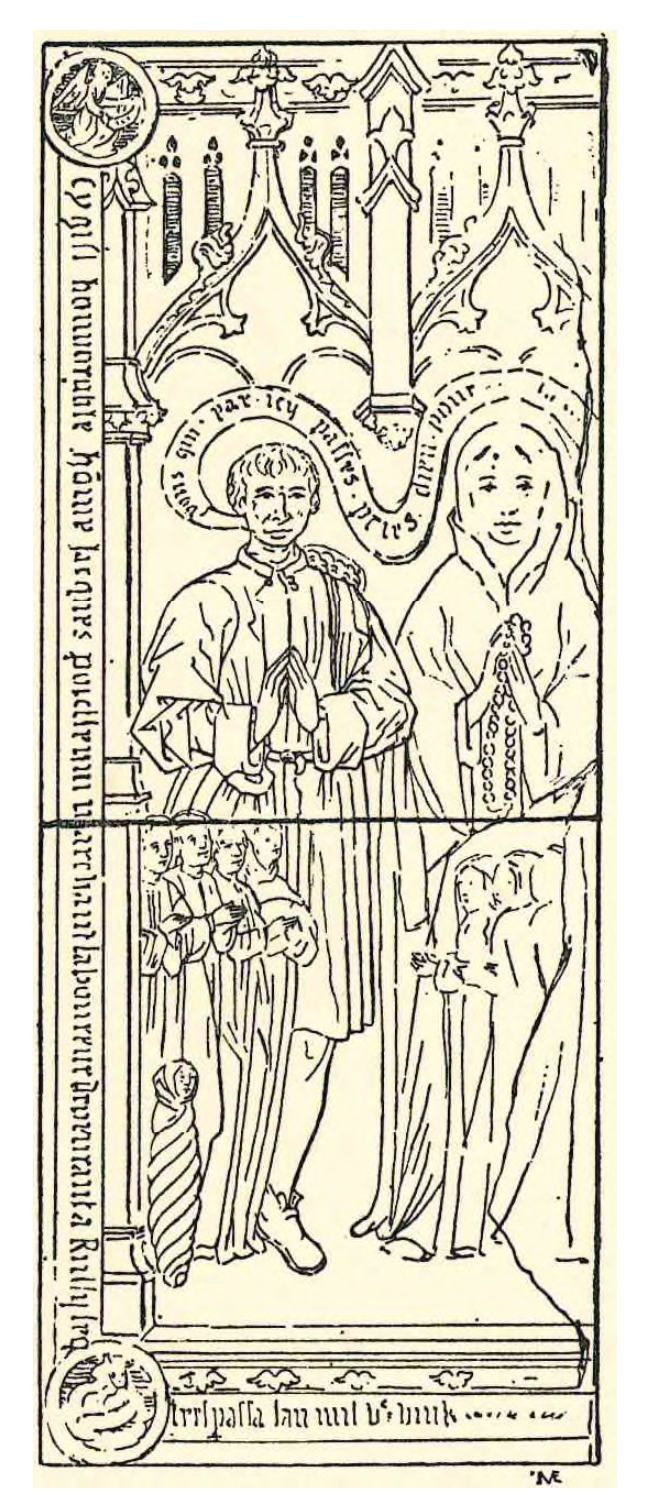 Dalle funéraire du laboureur Jacques et de sa femme.